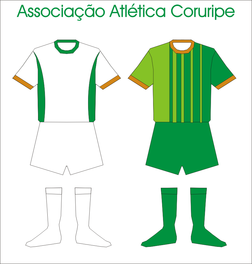 2006 Associação Atlética Coruripe's kits.